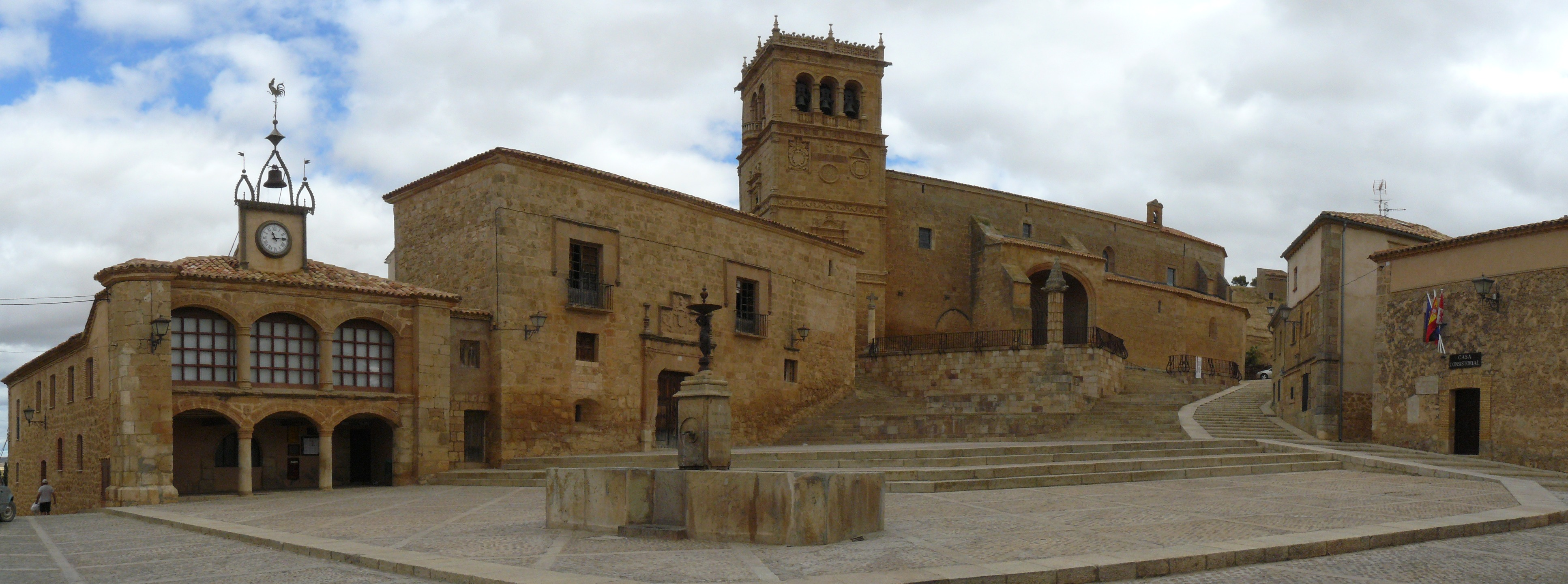 Vista de la Plaza Mayor y de la iglesia parroquial de la Asunción de Morón de Almazán.